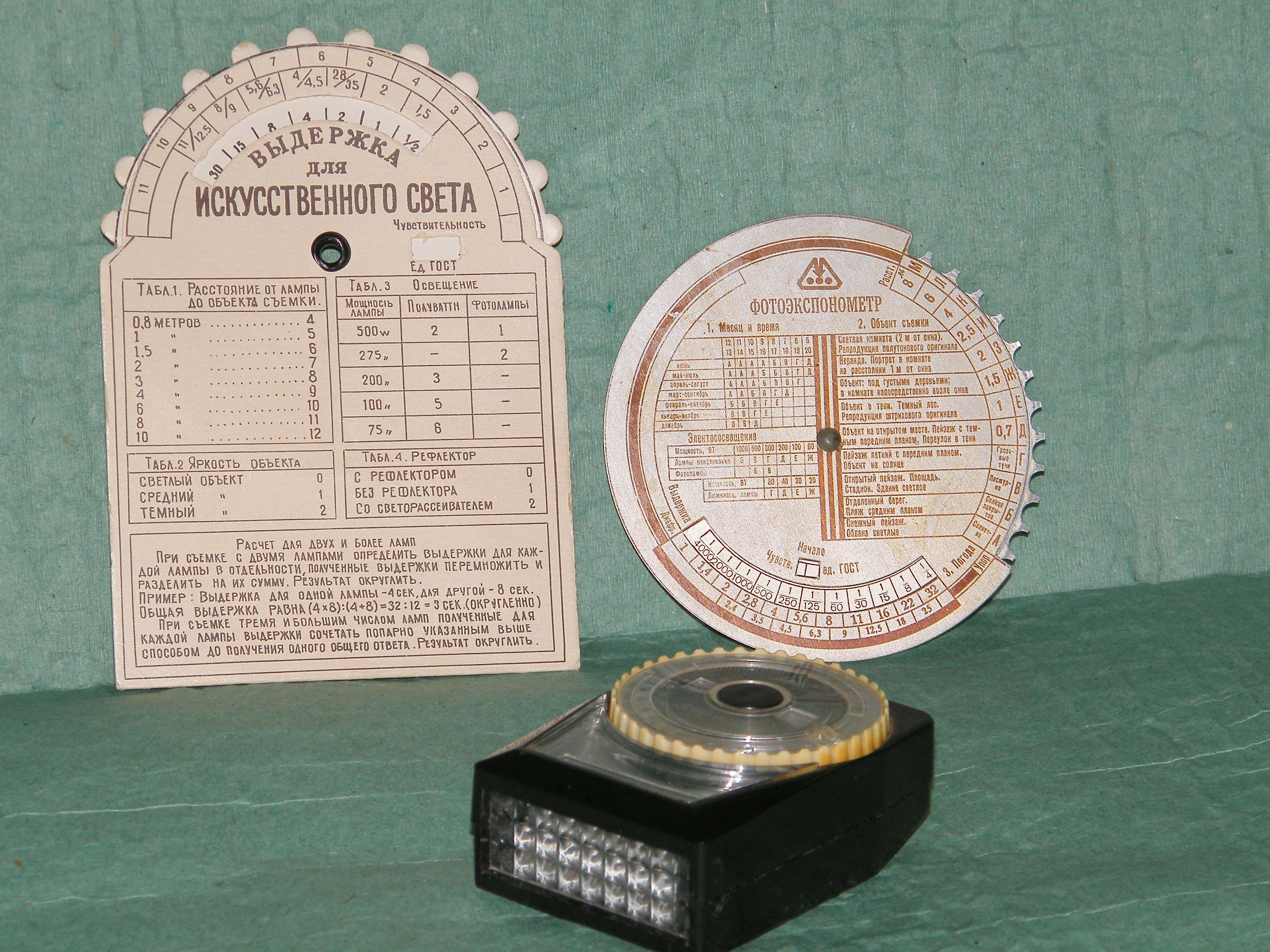 Табличные экспонометры производства СССР, 70-е годы.